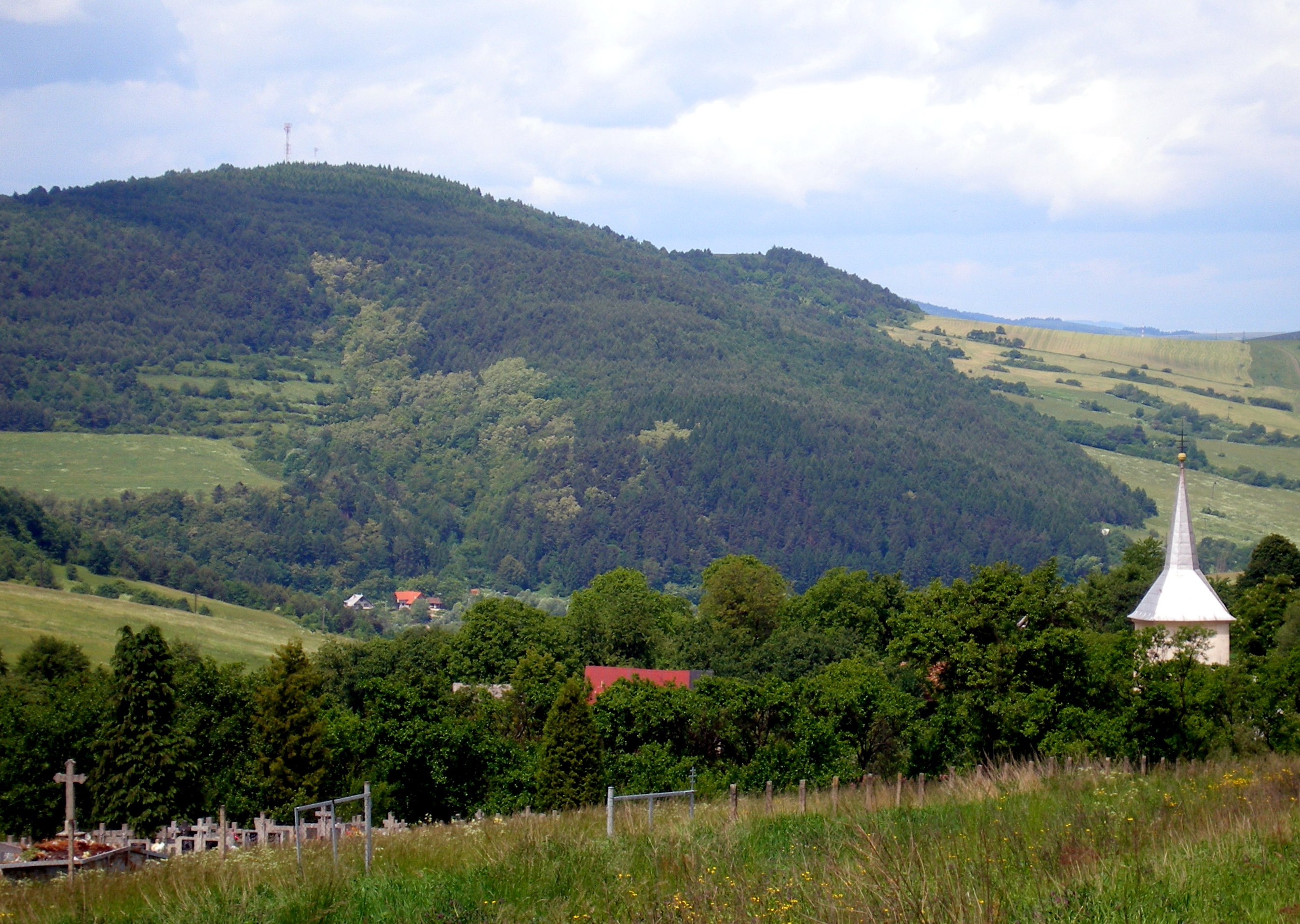 Obec Jakovany okres Sabinov